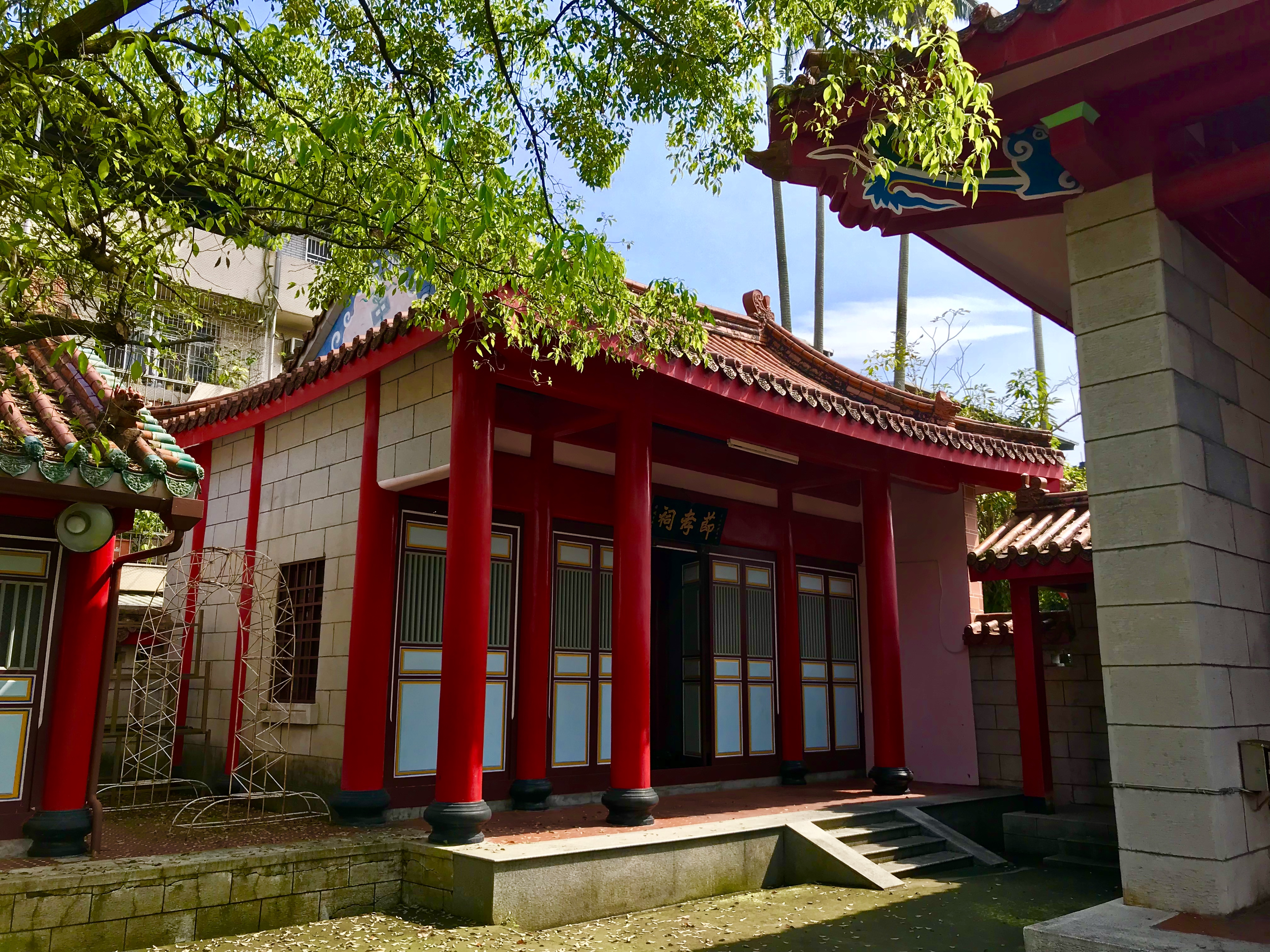 中文（台灣）: 宜蘭孔子廟節孝祠